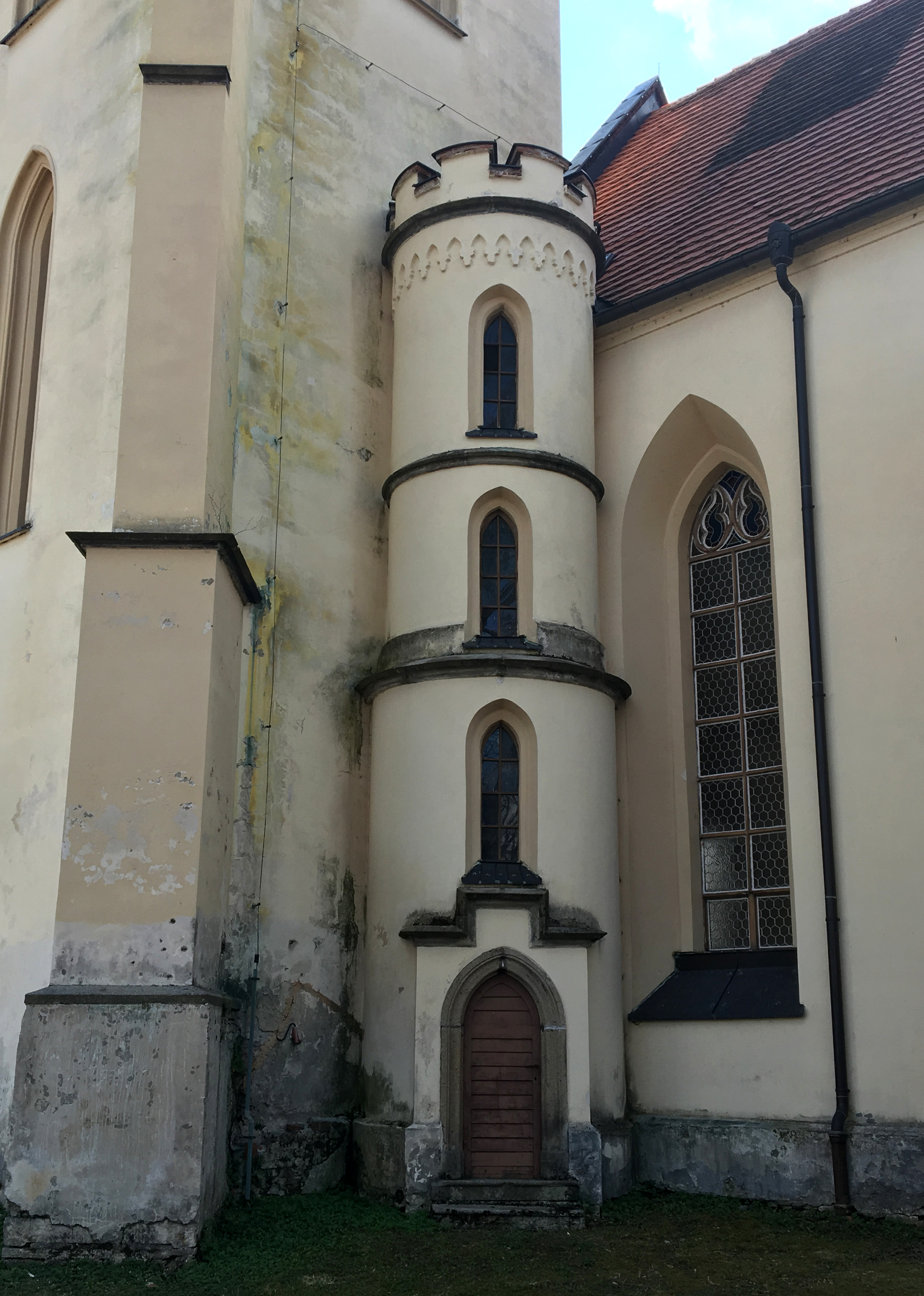 Kostel sv. Vavřince, schodiště